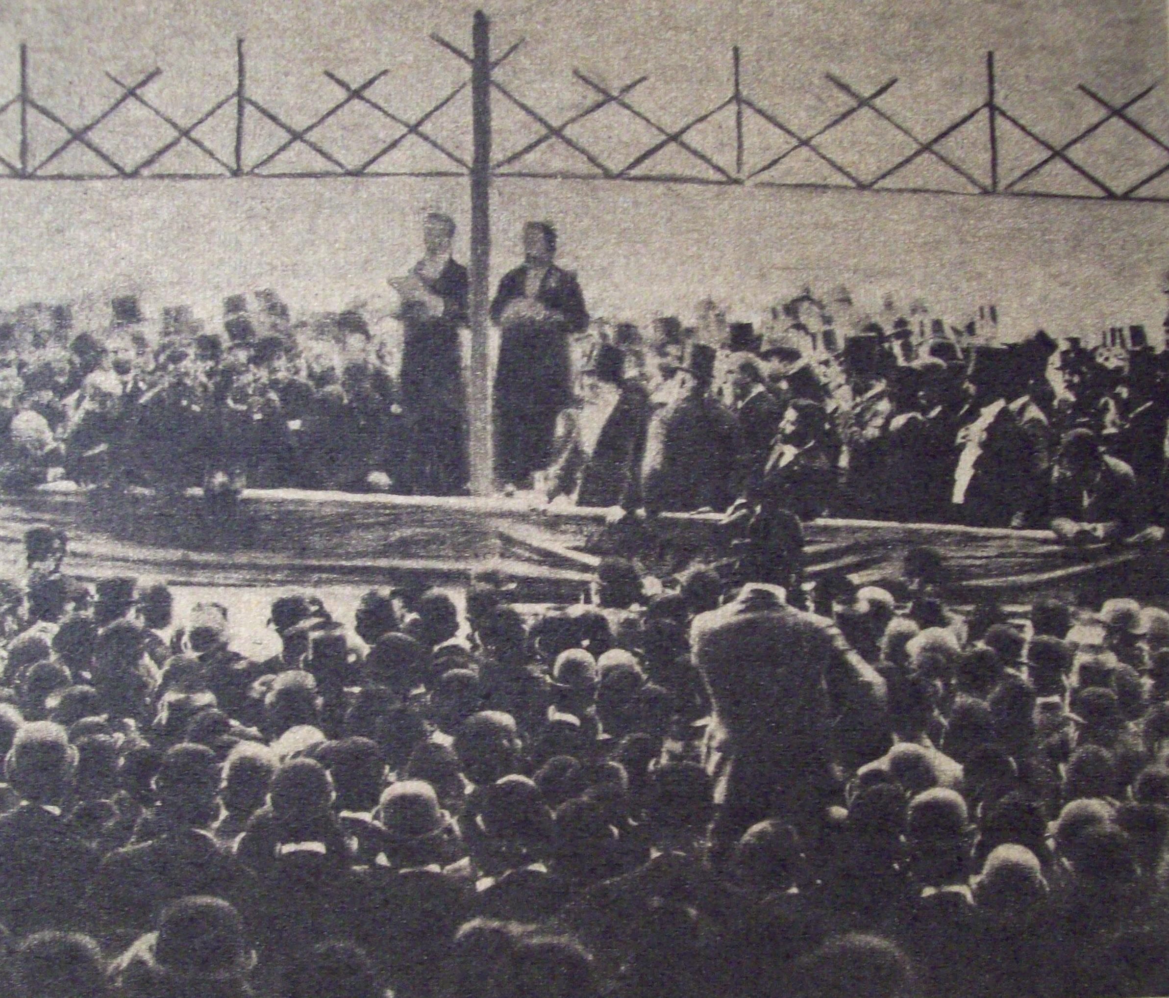 Meeting en el Jardín Florida, hecho acontecido el 1 de septiembre de 1889 en donde Leandro Alem se volvió a presentar en política.